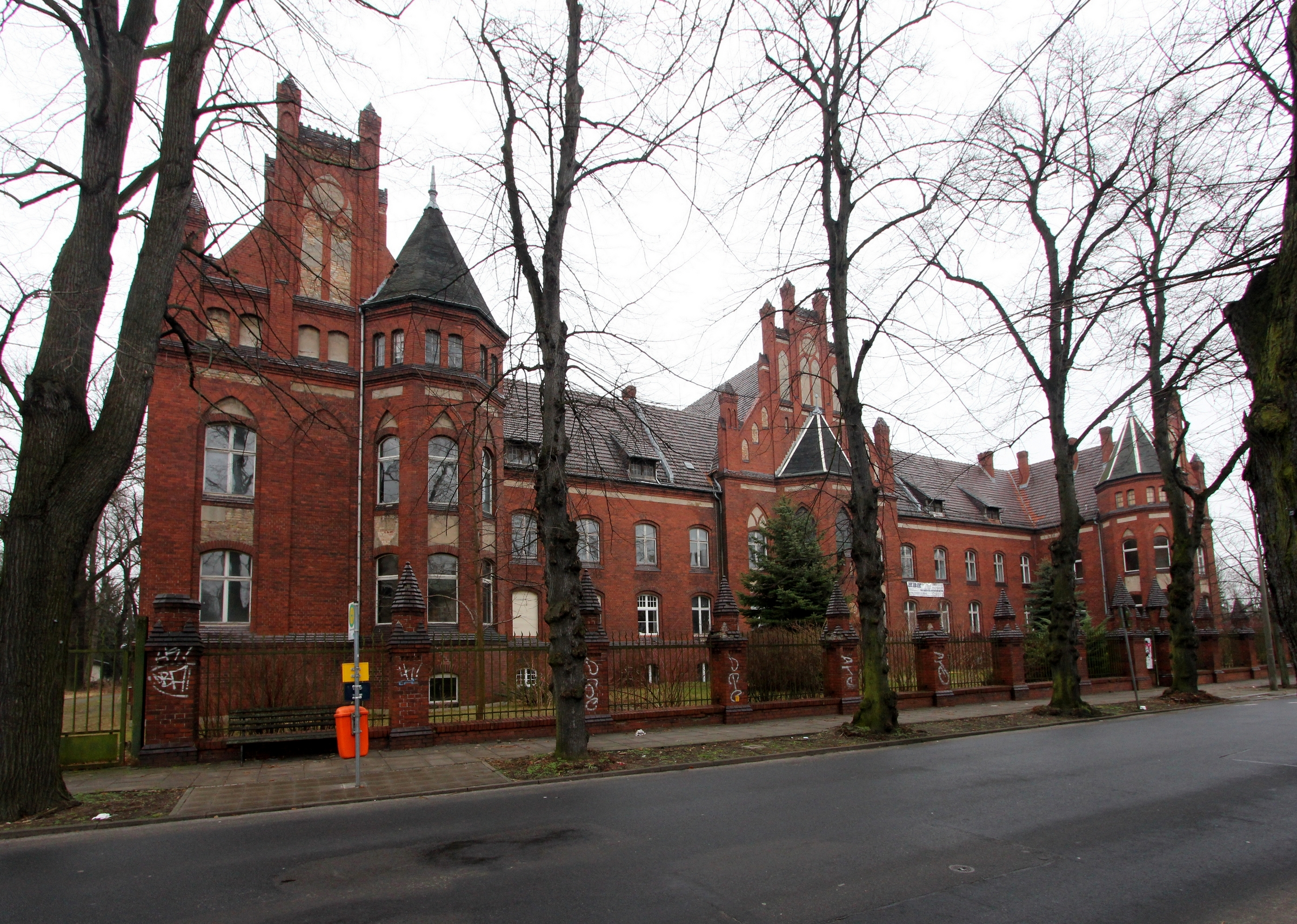 Luckenwalde in Brandenburg, das Gebrüder-Heinrich-Stift. Das Gebäude ist ein eingetragenes Baudenkmal und steht unter Denkmalschutz.[1] ↑ MAZ online vom 31. Januar 2014